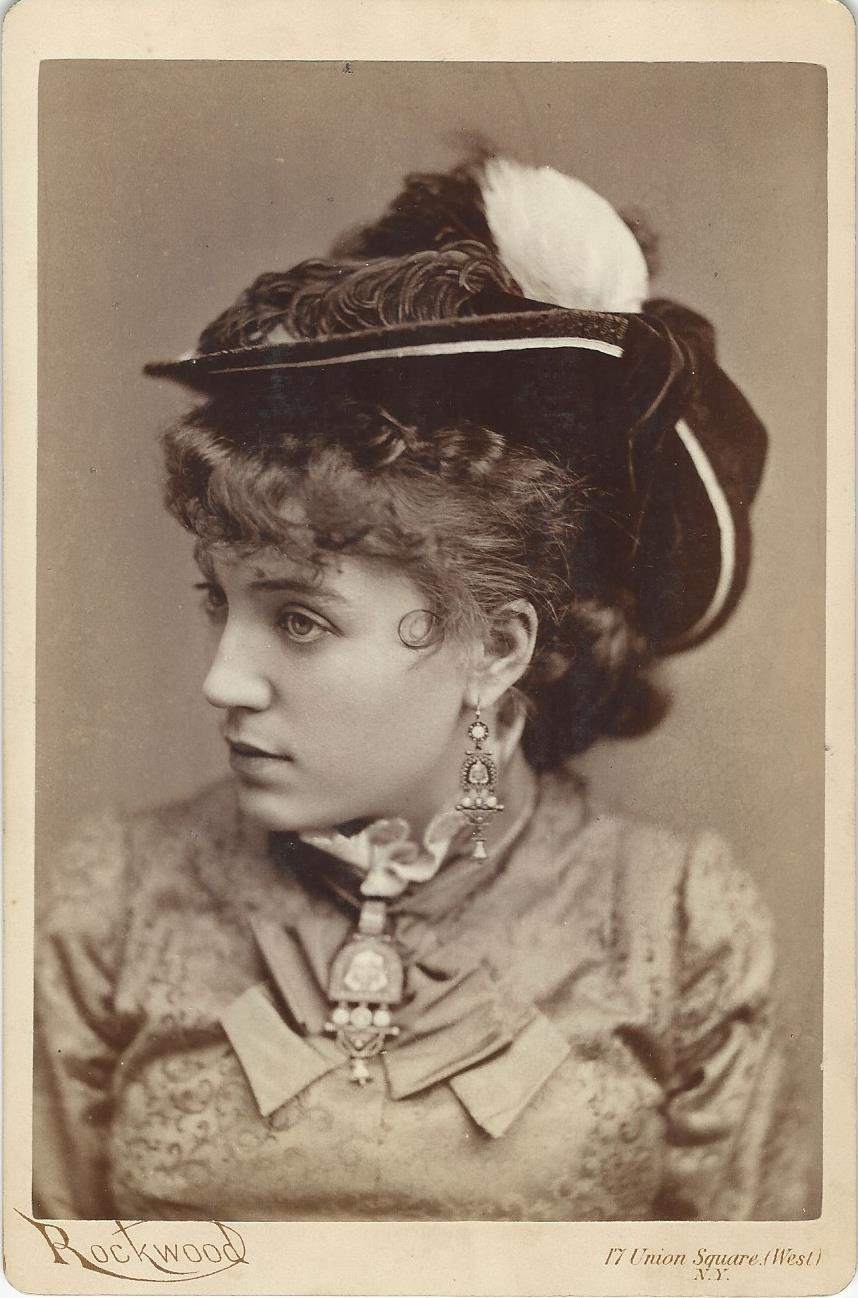 Clara Morris